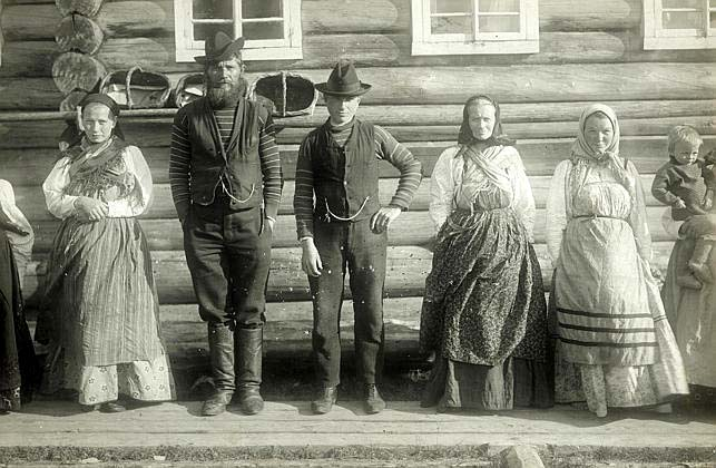 Крестьянская семья в праздничных костюмах. (Беломорское поморье). Русские. Фотоархив РЭМ